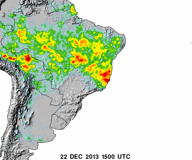 Acumulado de sete dias de chuva sobre a América do Sul até as 15h UTC de 22 de dezembro de 2013